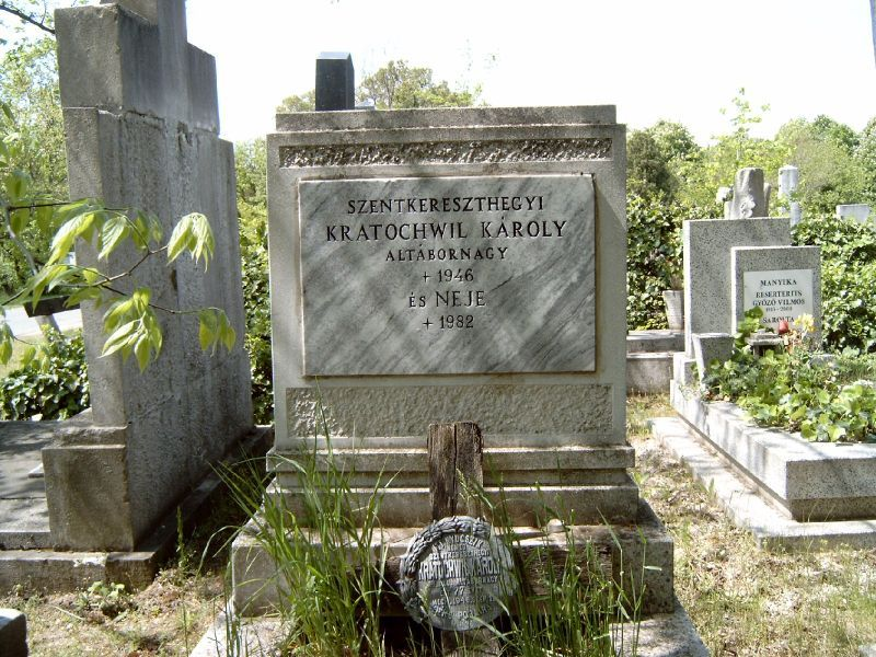 Kratochwill Károly (Kőszeg, 1869. dec. 13. – 1946. szept. 19.): altábornagy, múzeumigazgató sírja Budapesten. Új köztemető: 16/5-1-40.